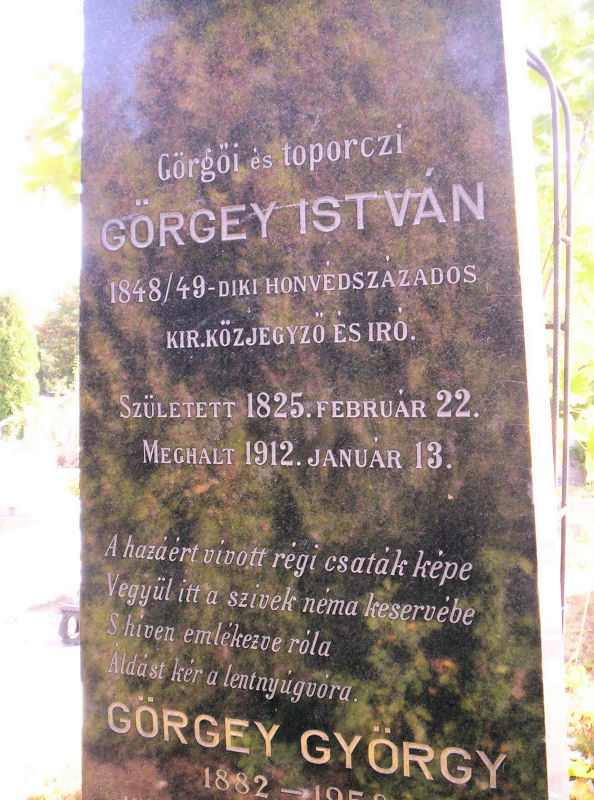 Görgey István (1825–1912) honvéd százados, történetíró sírja az Óbudai temetőben